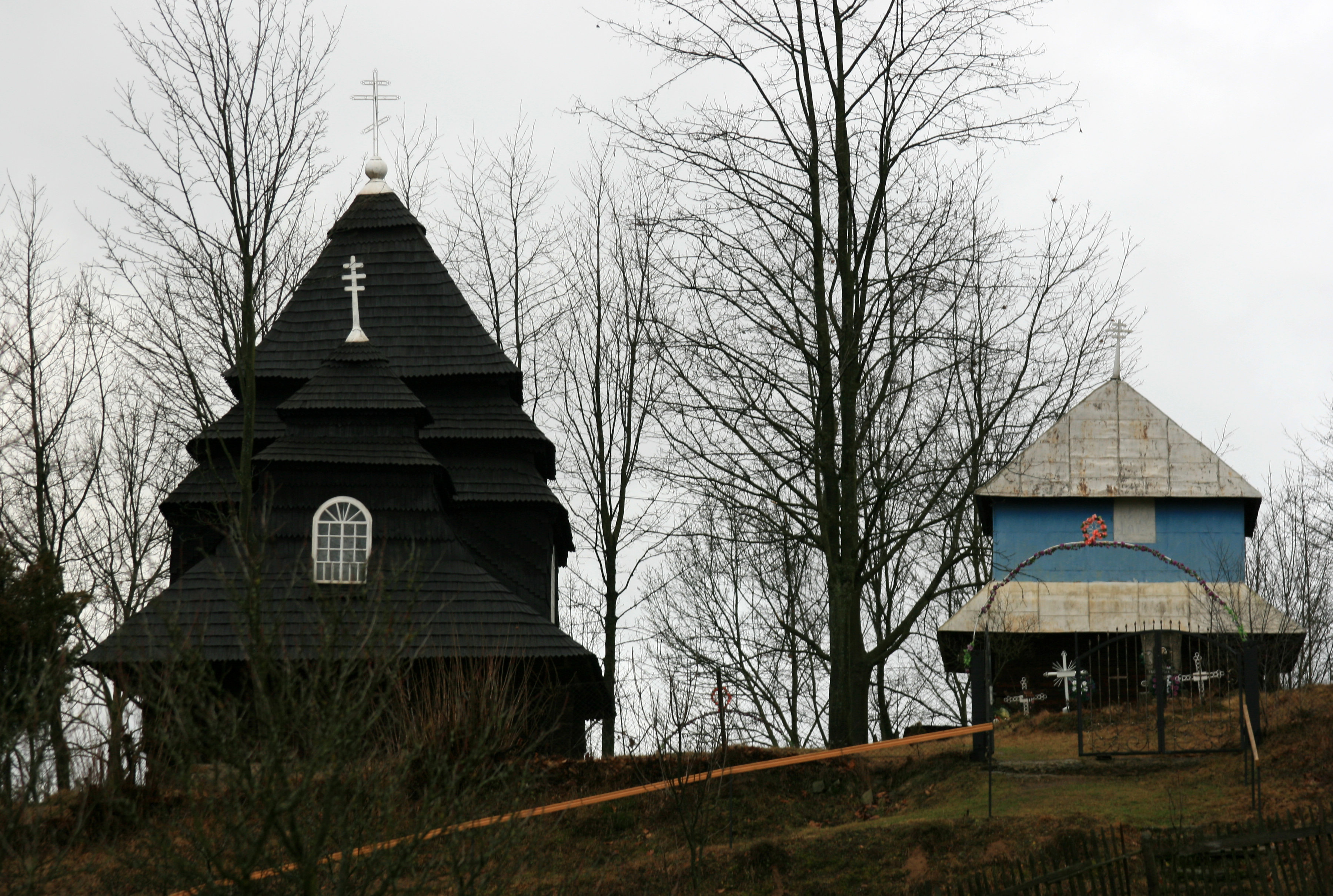 Деревянная церковь в селе Ужок на Закарпатье.